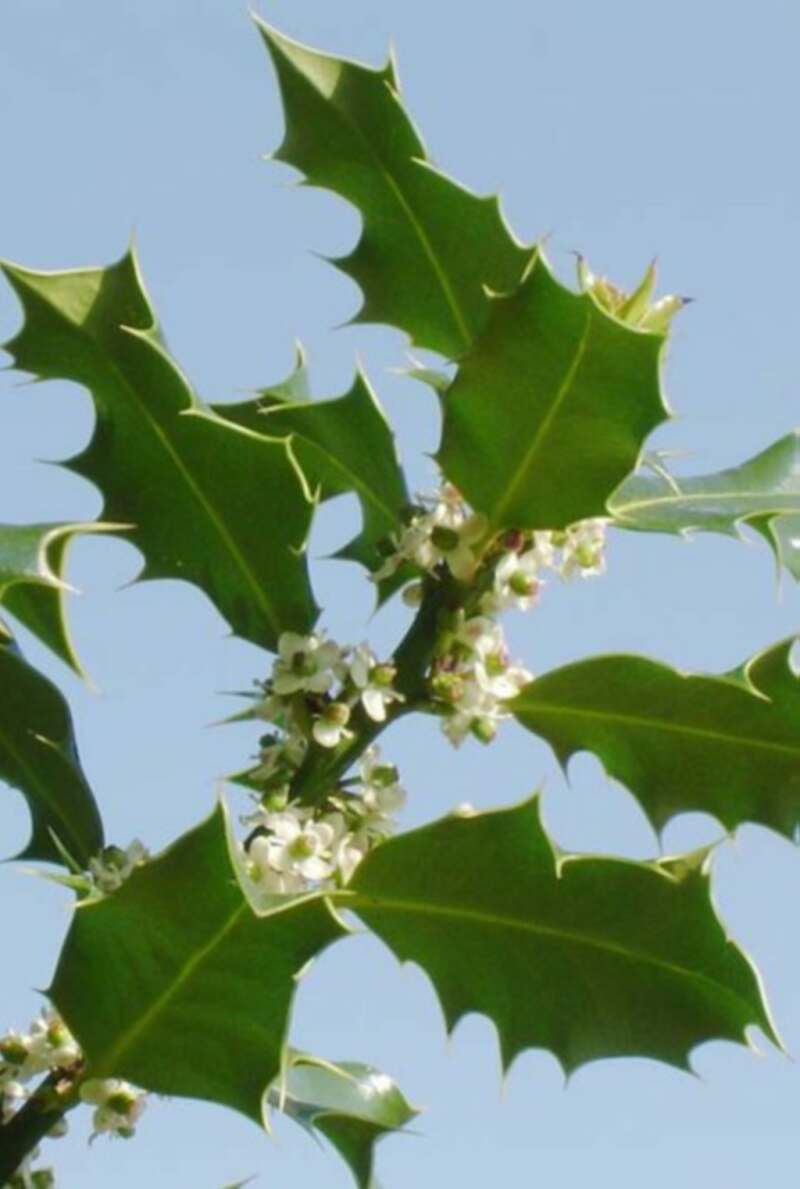 Rameau fleuri de houx commun (Ilex aquifolium) Source